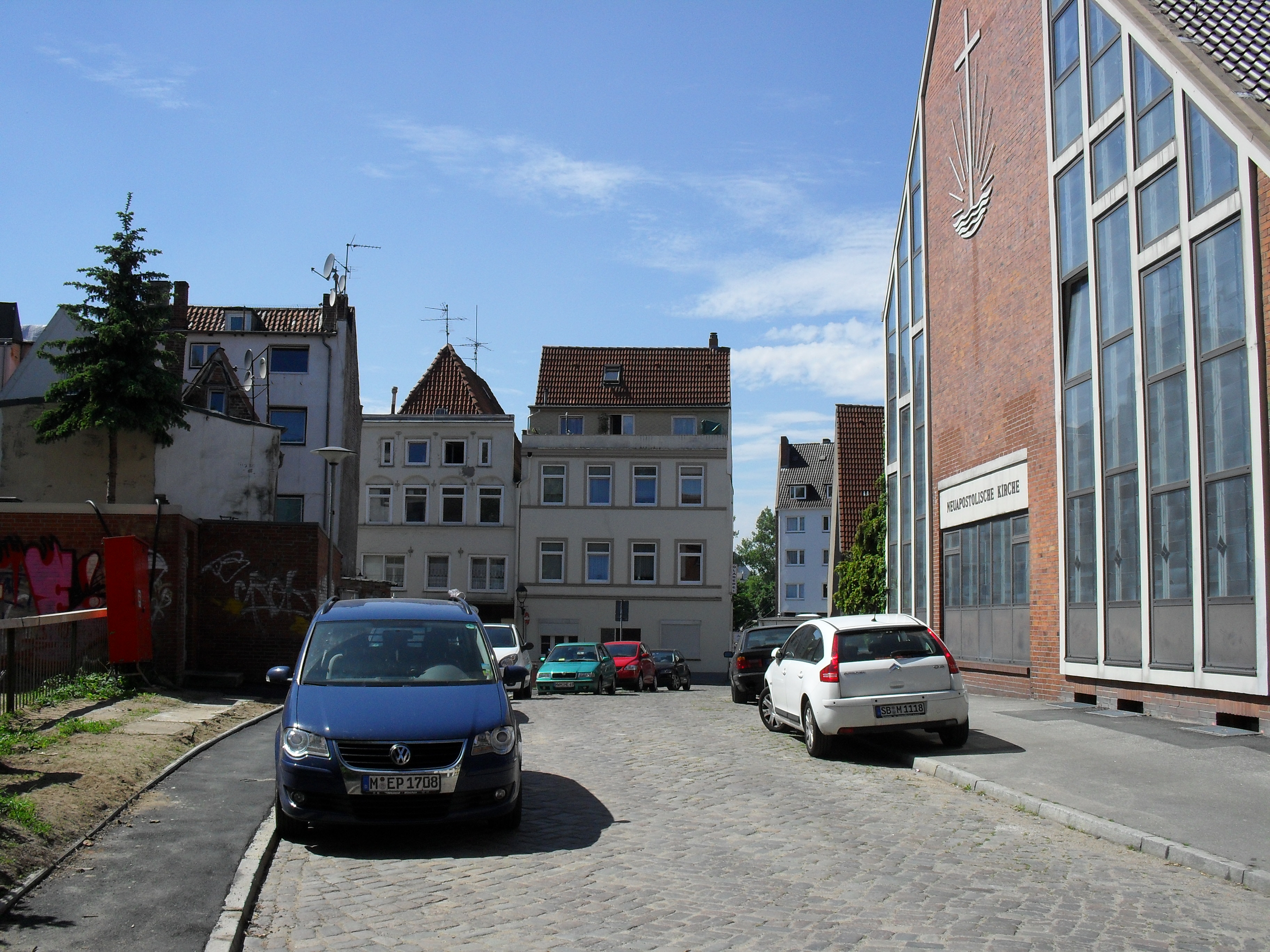 Die Bierspünderstraße in Lübeck